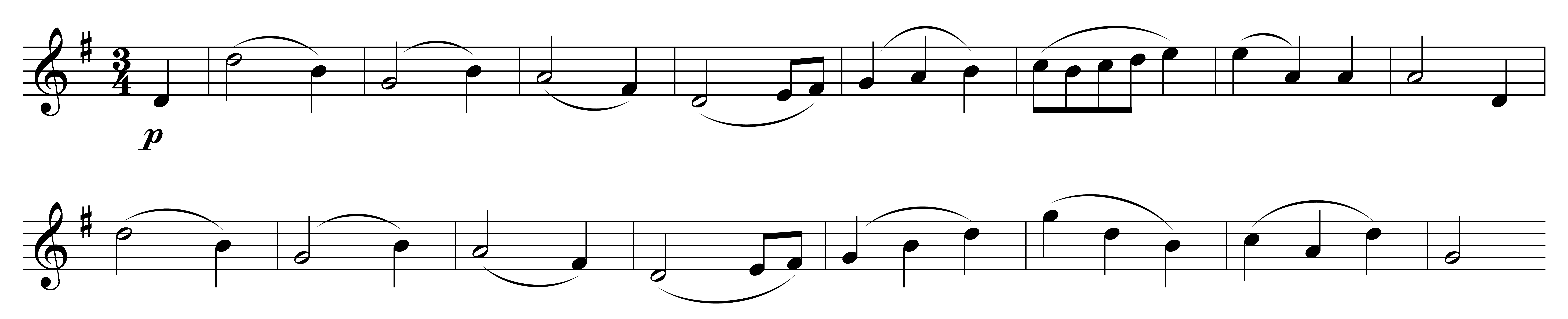 Notenbeispiel Schubert Sinfonie 5 - 3.Satz Trio T. 1-16